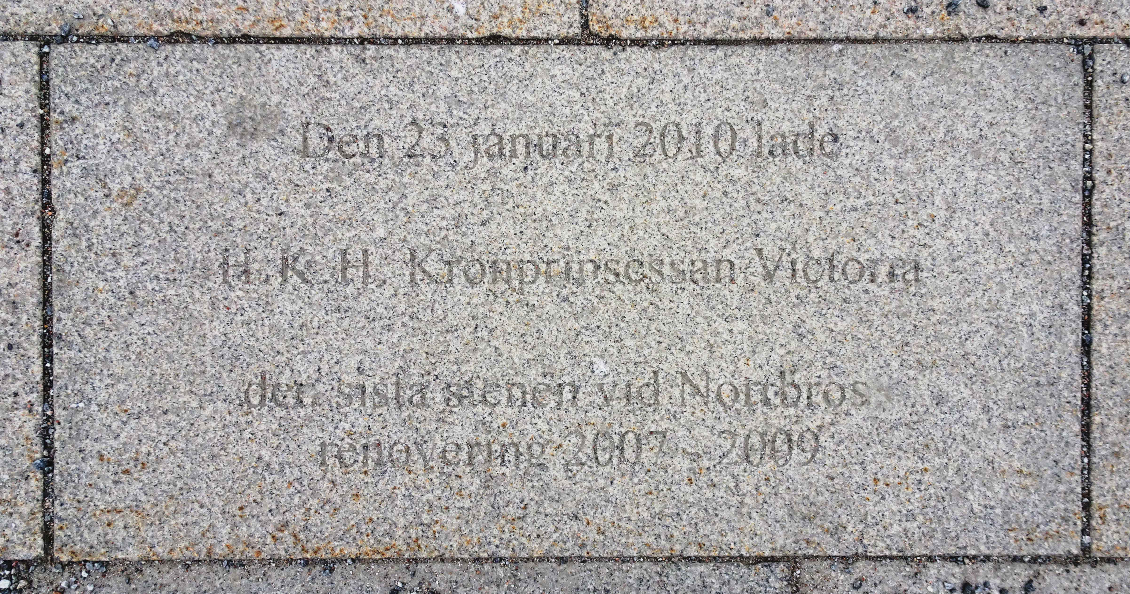 Minnesplatta i gångbanan på Norrbro: Den 23 januari 2010 lade H K H Kronprinsessan Victoria den sista stenen vid Norrbros renovering 2007–2009